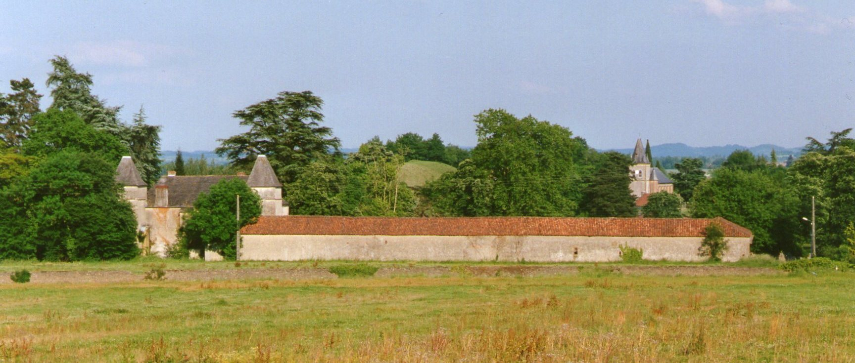 Vue panoramique du château, de la motte et de l'église de Sombrun. Sombrun. Hautes-Pyrénées. France.